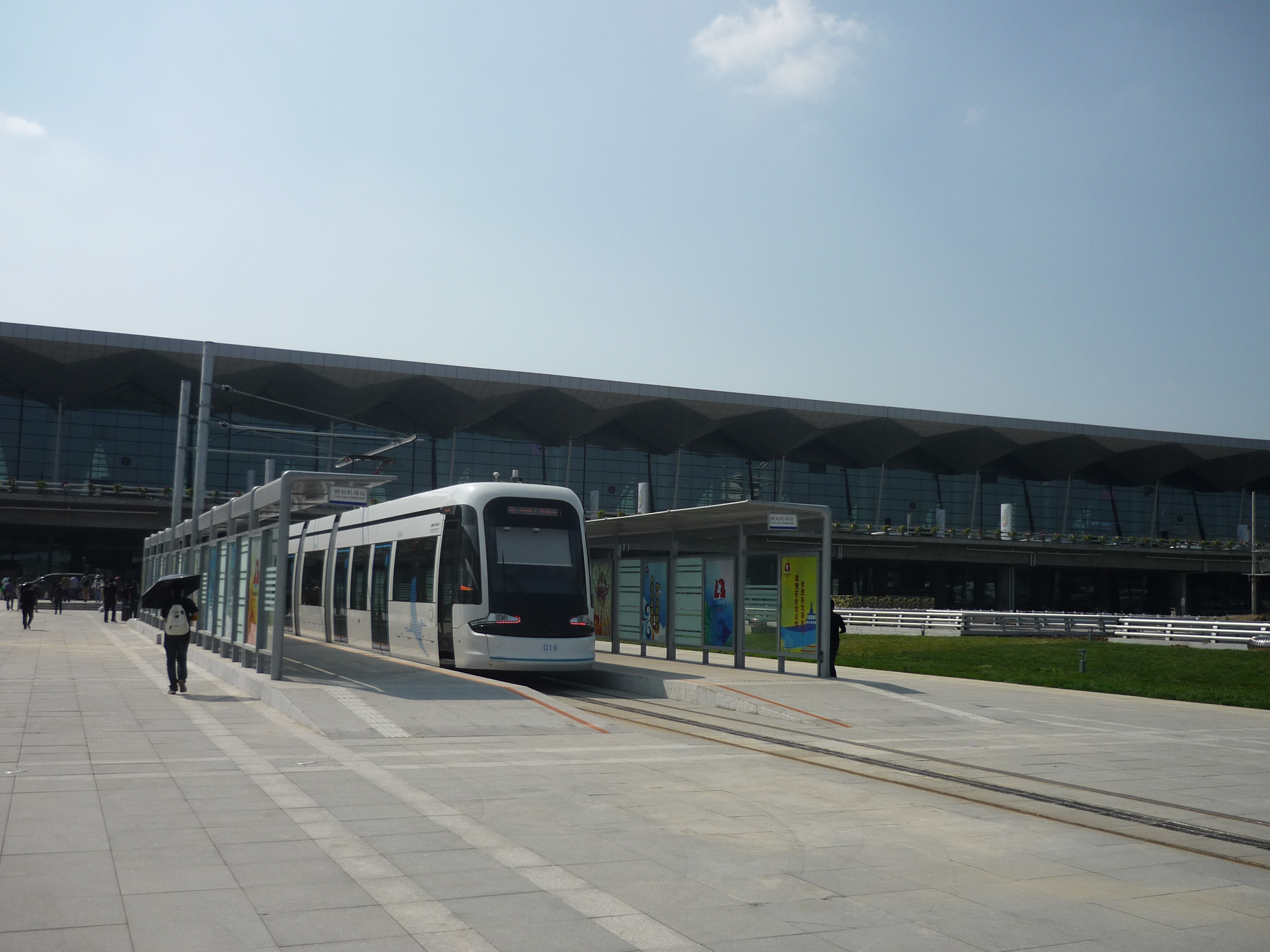 瀋陽桃仙国際空港前の路面電車停留所